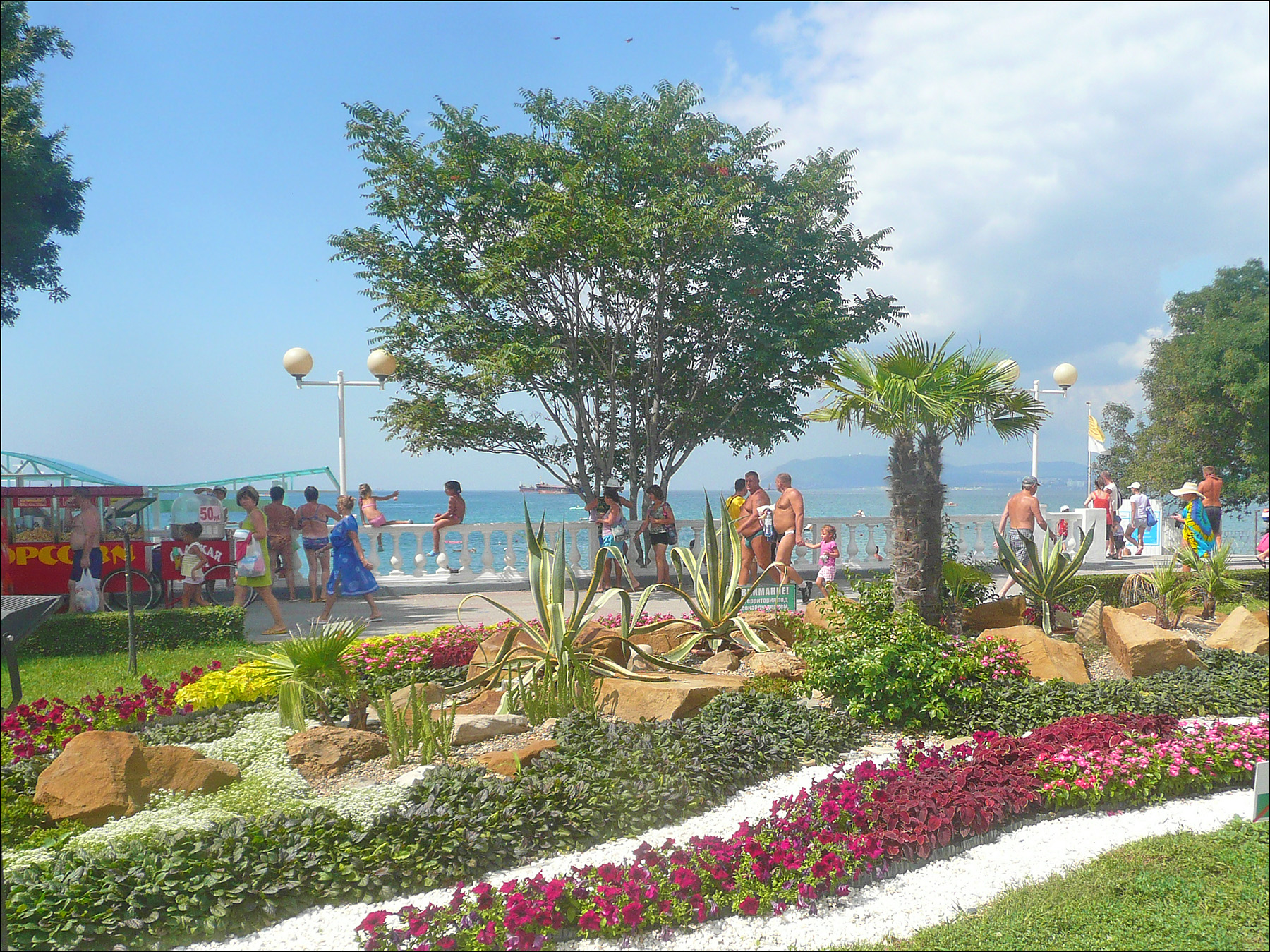 Набережная Кабардинки